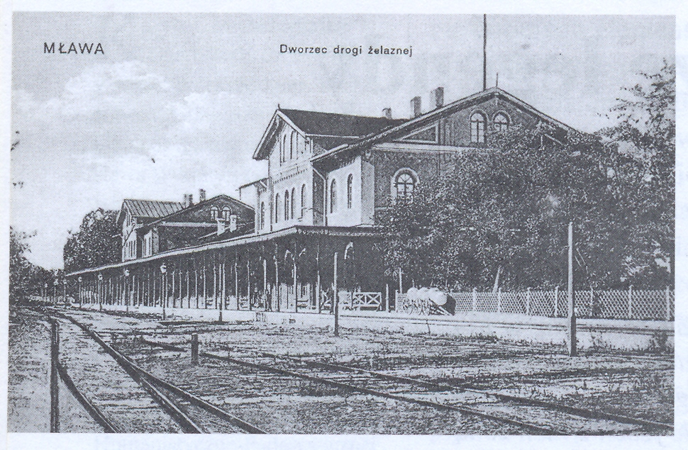 Pocztówka - nieistniejąca stacja Kolei Nadwiślańskiej w Mławie.